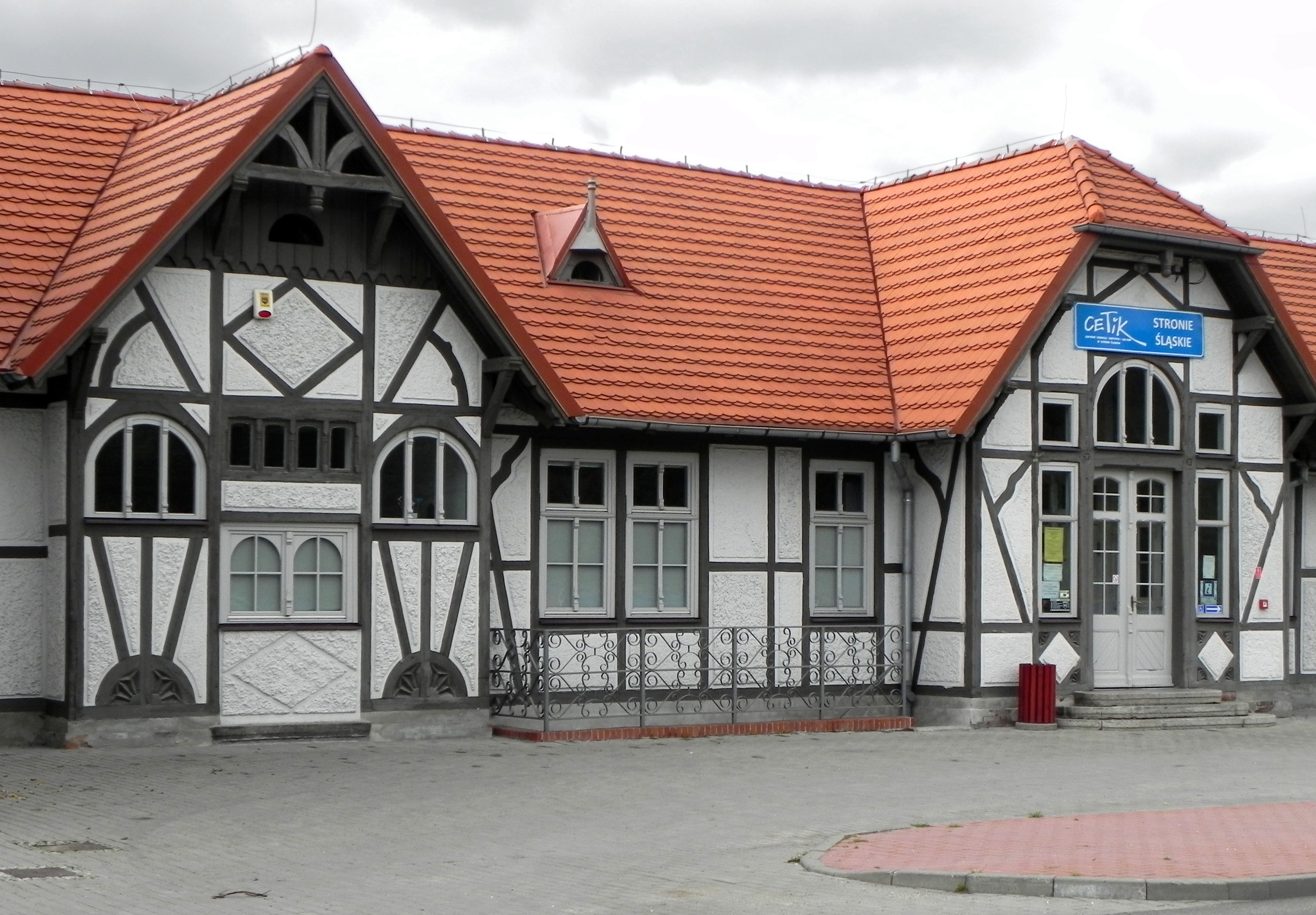 Stronie Śląskie, budynek dworca kolejowego, 1897